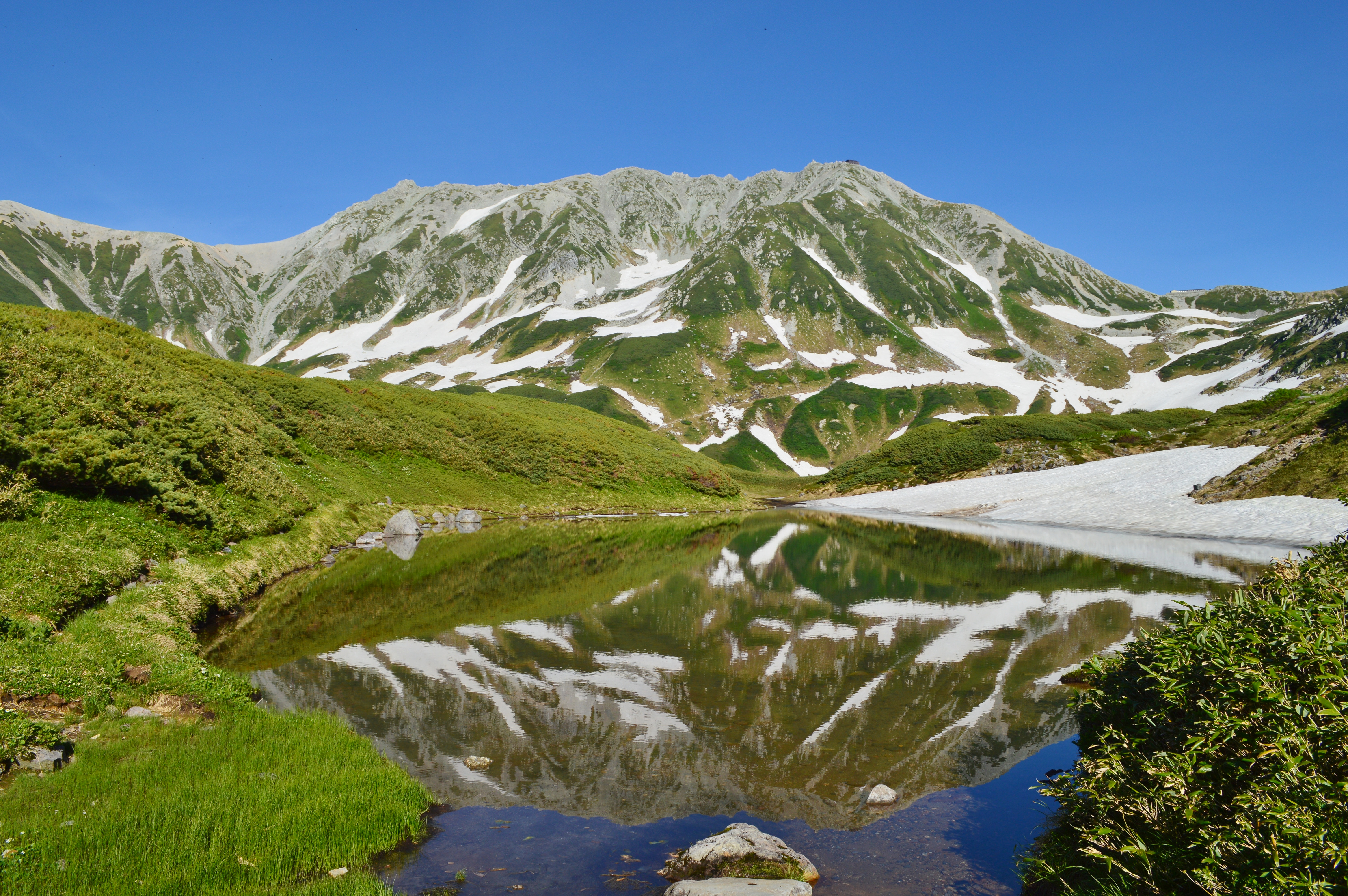 ミドリガ池から望む立山